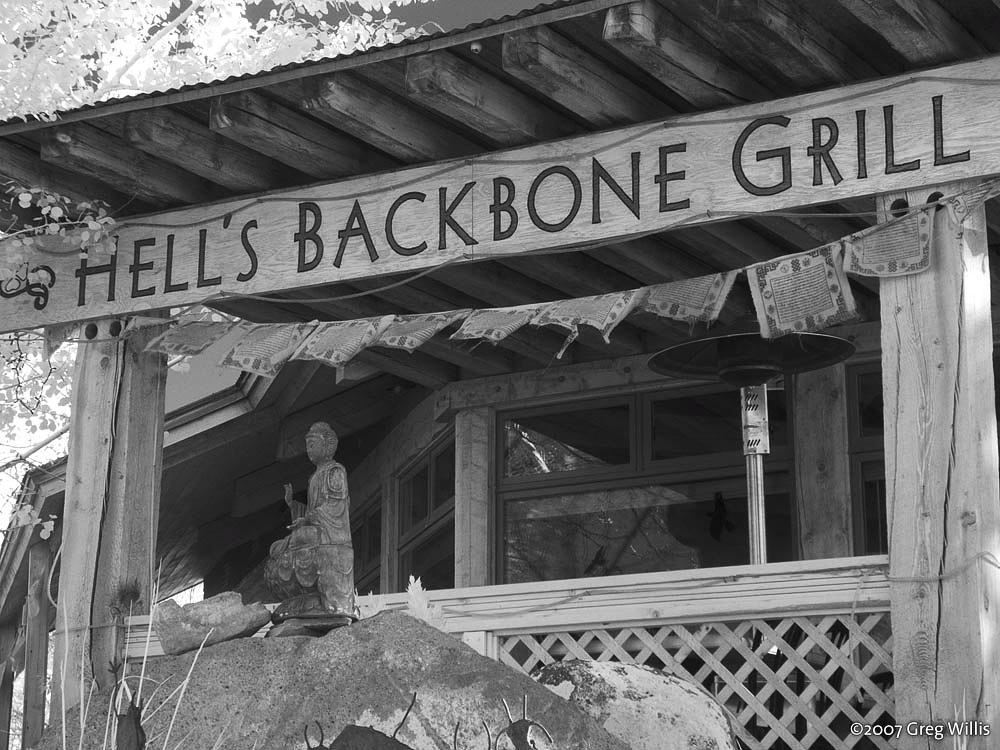 Hell's Backbone Grill, Boulder UT